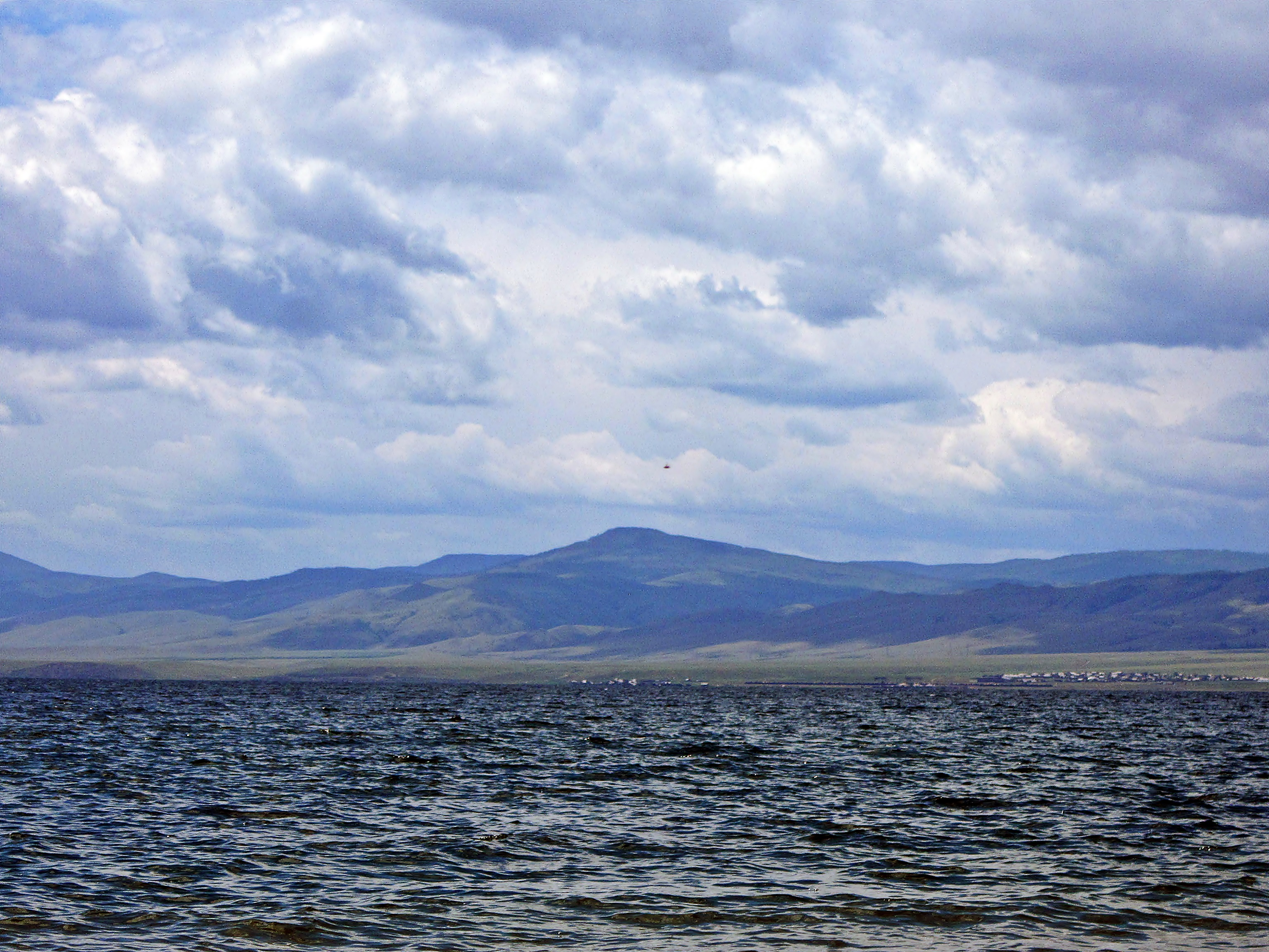 Гусиное озеро. Вид с северо-восточного берега. Вдали — Хамбинский хребет Хамар-Дабана. На берегу — посёлок Бараты.